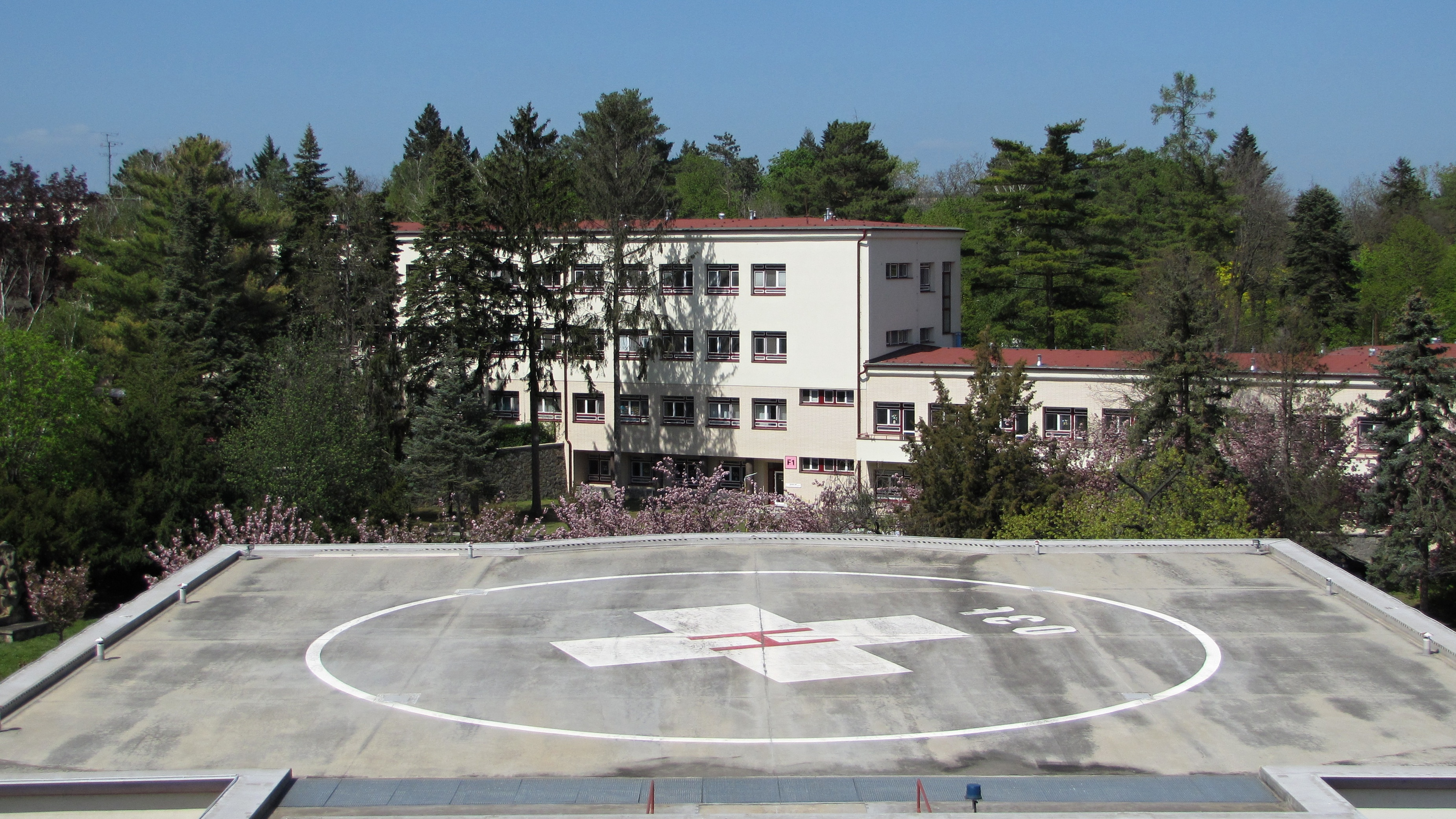 Nemocnice Kyjov, heliport